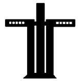 Símbolo de la candidatura independiente a diputado de Pedro Velásquez Seguel en las elecciones parlamentarias de Chile de 2009.